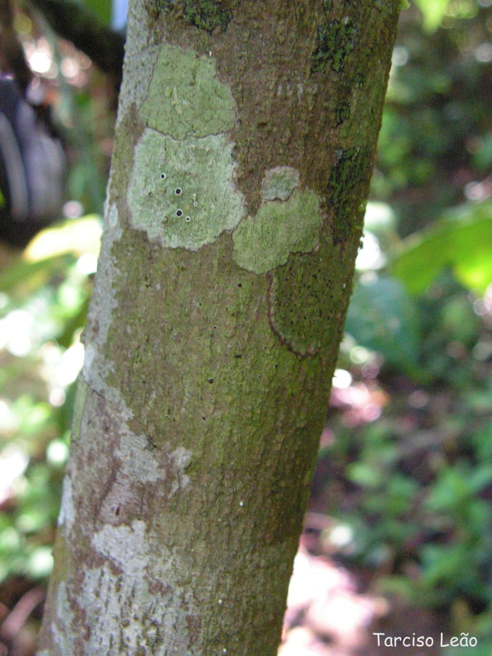 Arbusto ou arvoreta de sub-bosque com forte odor desagradável